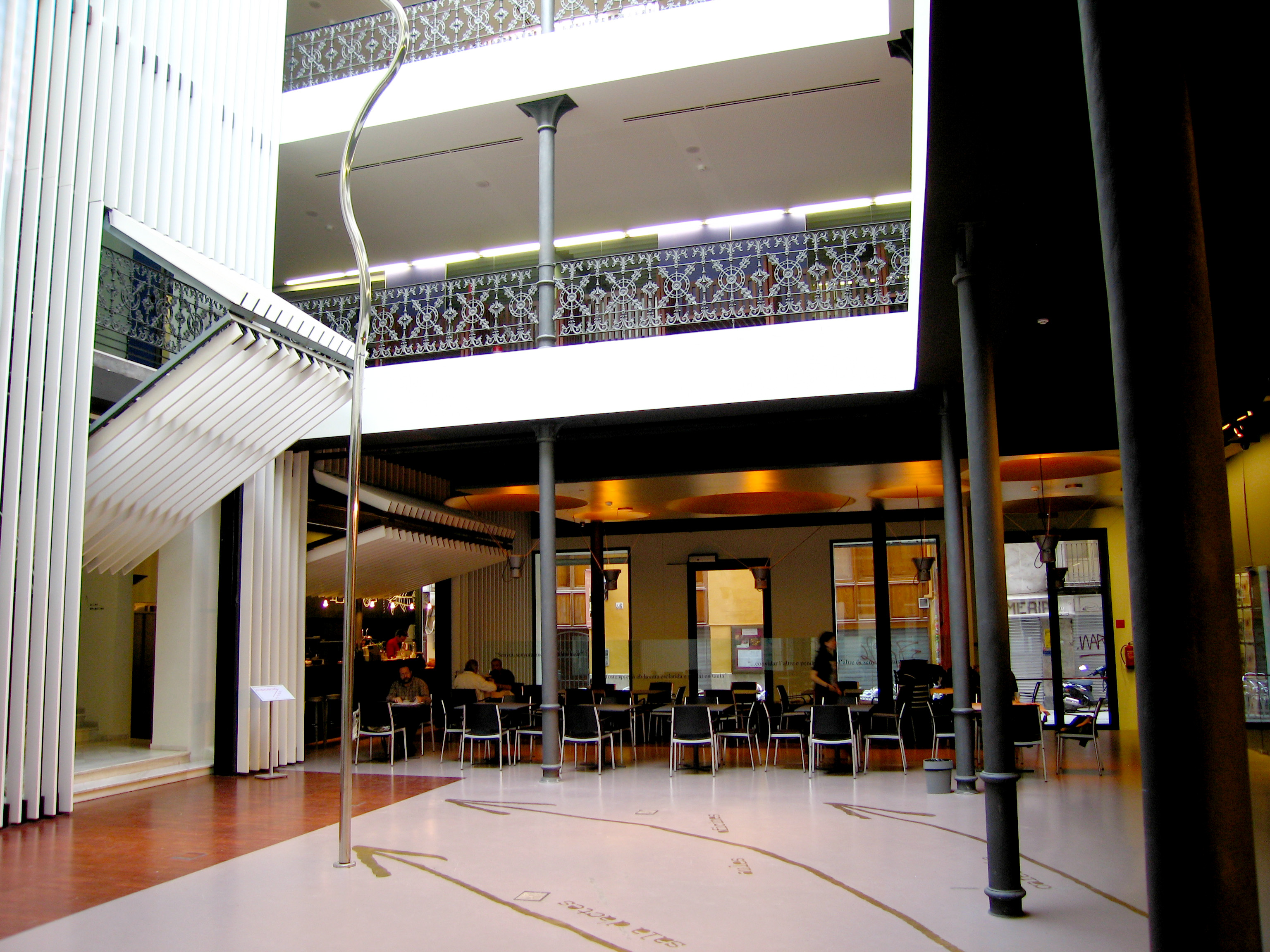 Fundació Octubre València